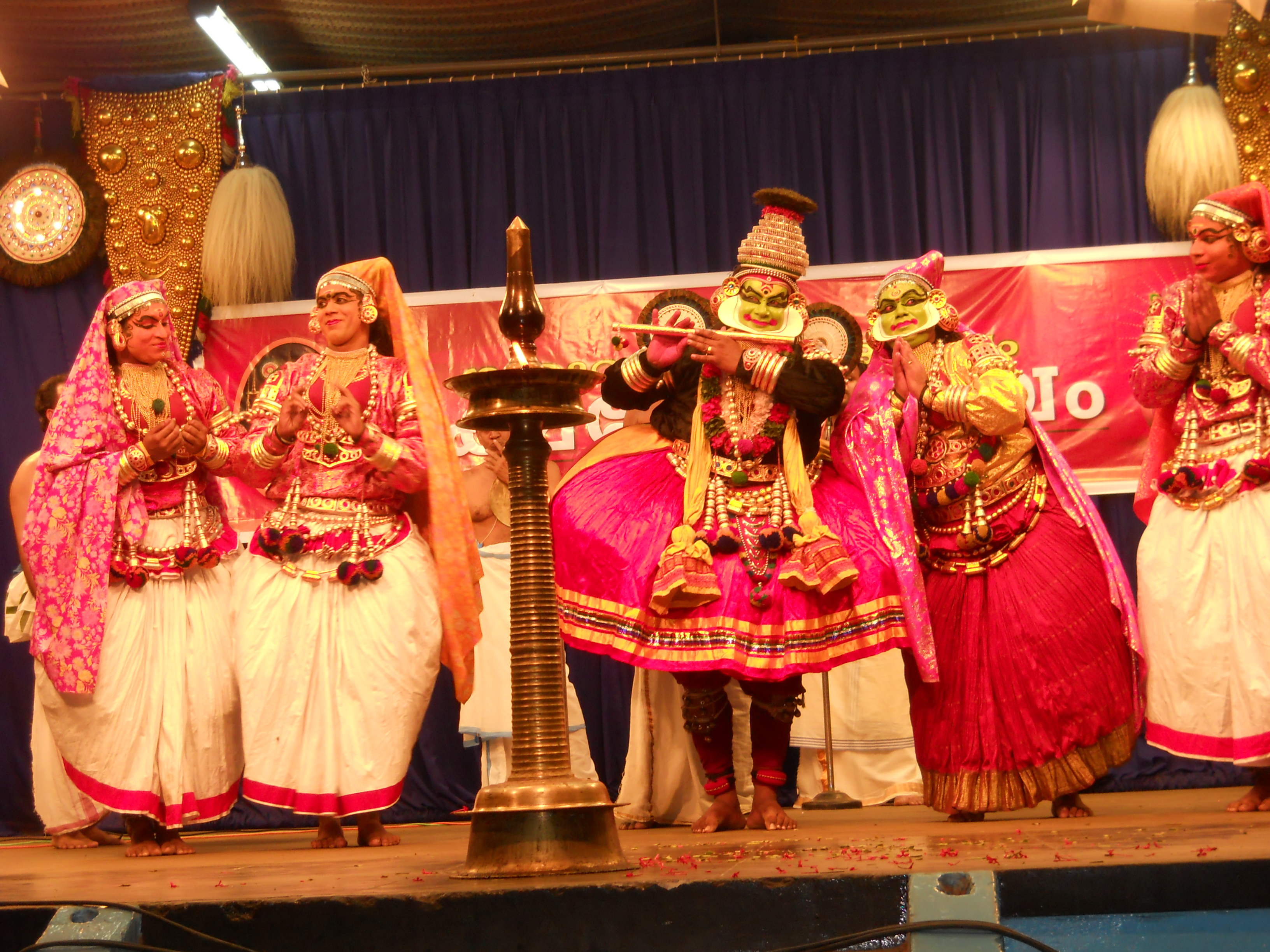 കൃഷ്ണനാട്ടം